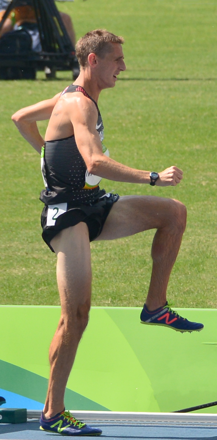 Série du 3000m steeple Homme des JO de Rio, 2016